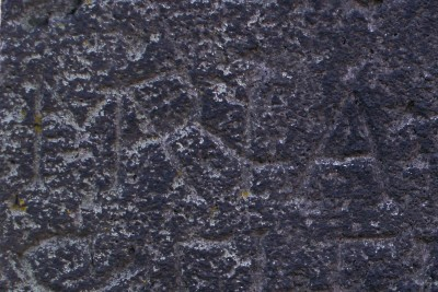 Basaltschrift